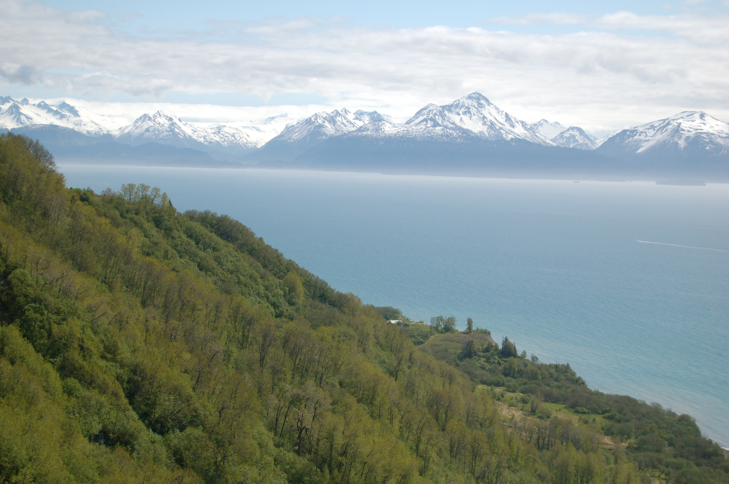 Kachemak Bay near Homer - June 1, 2011.